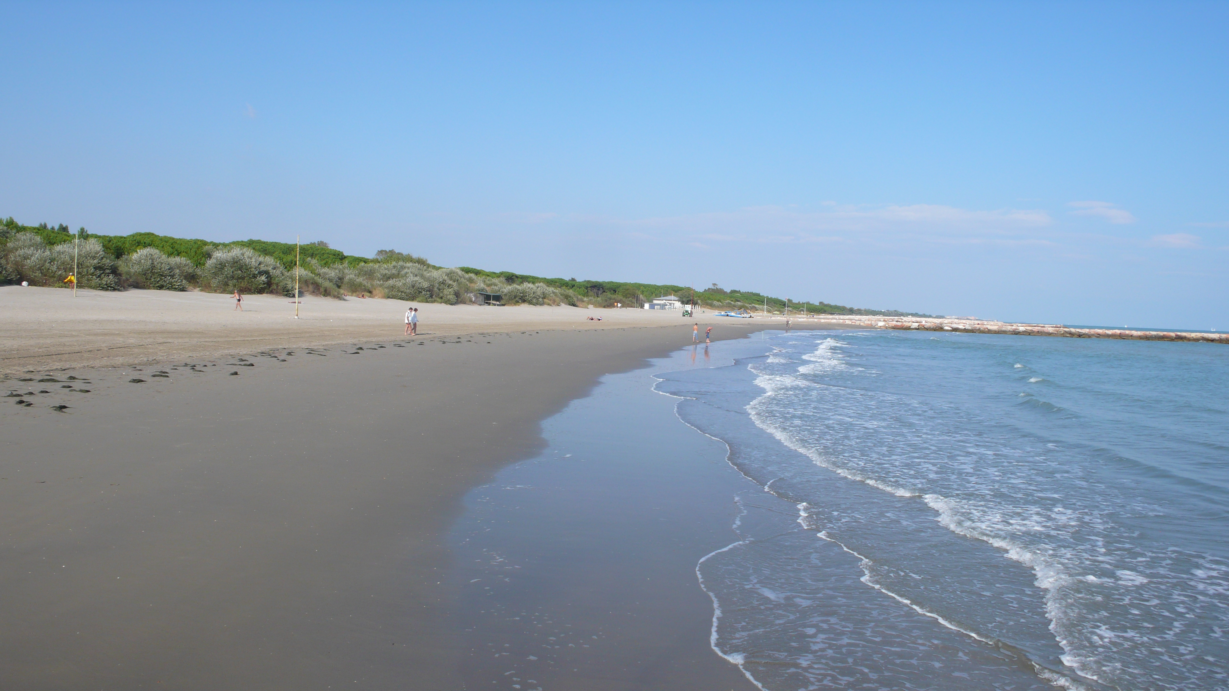 Foto della spiaggia di Eraclea.